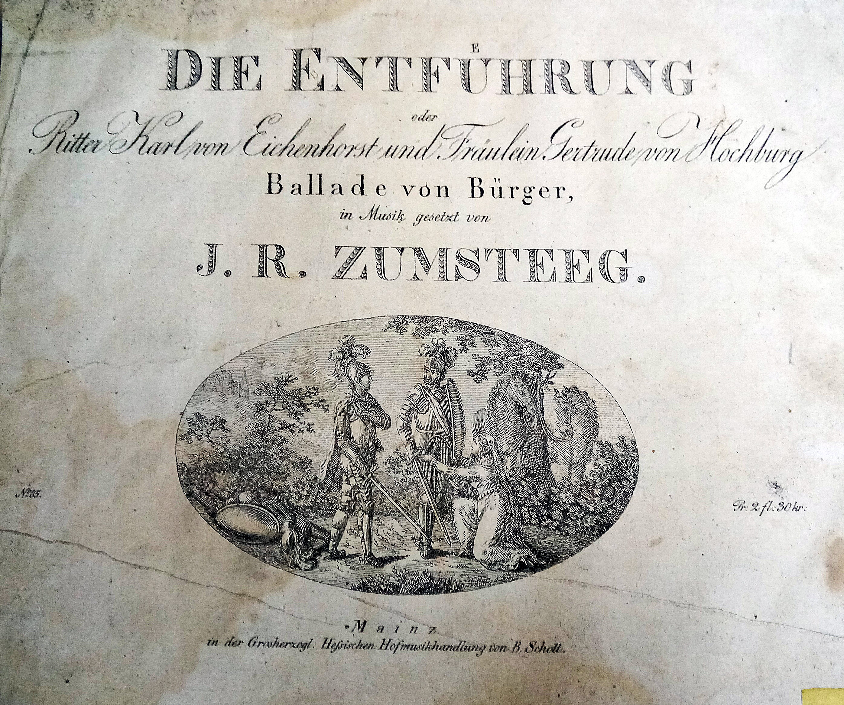 Titelblatt einer Komposition von Johann Rudolf Zumsteeg, um 1830 (eigener Scan)